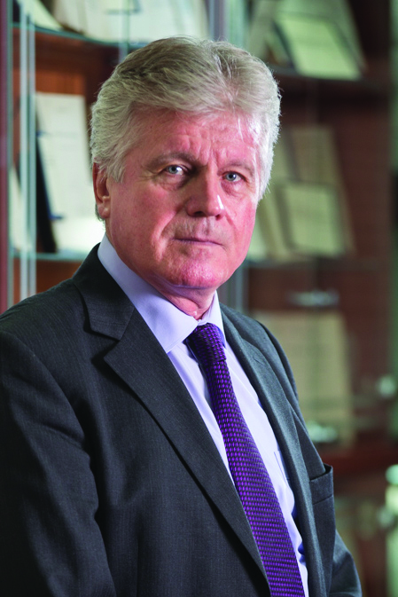 Српски (ћирилица): Предраг Јовановић